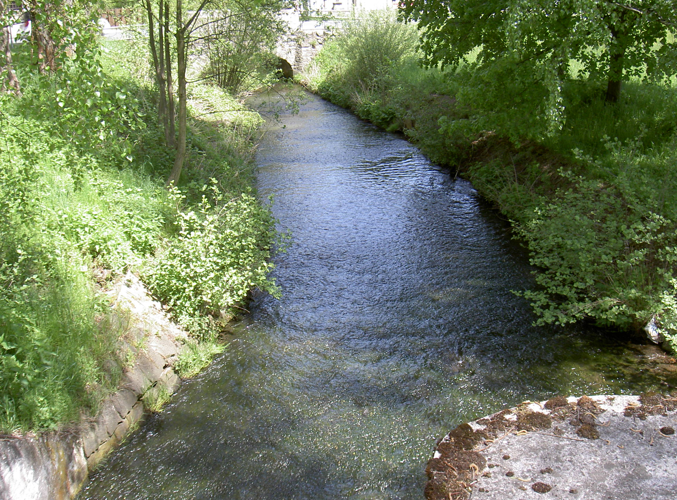 Schwarzbach (Černý potok) bei Trhanov